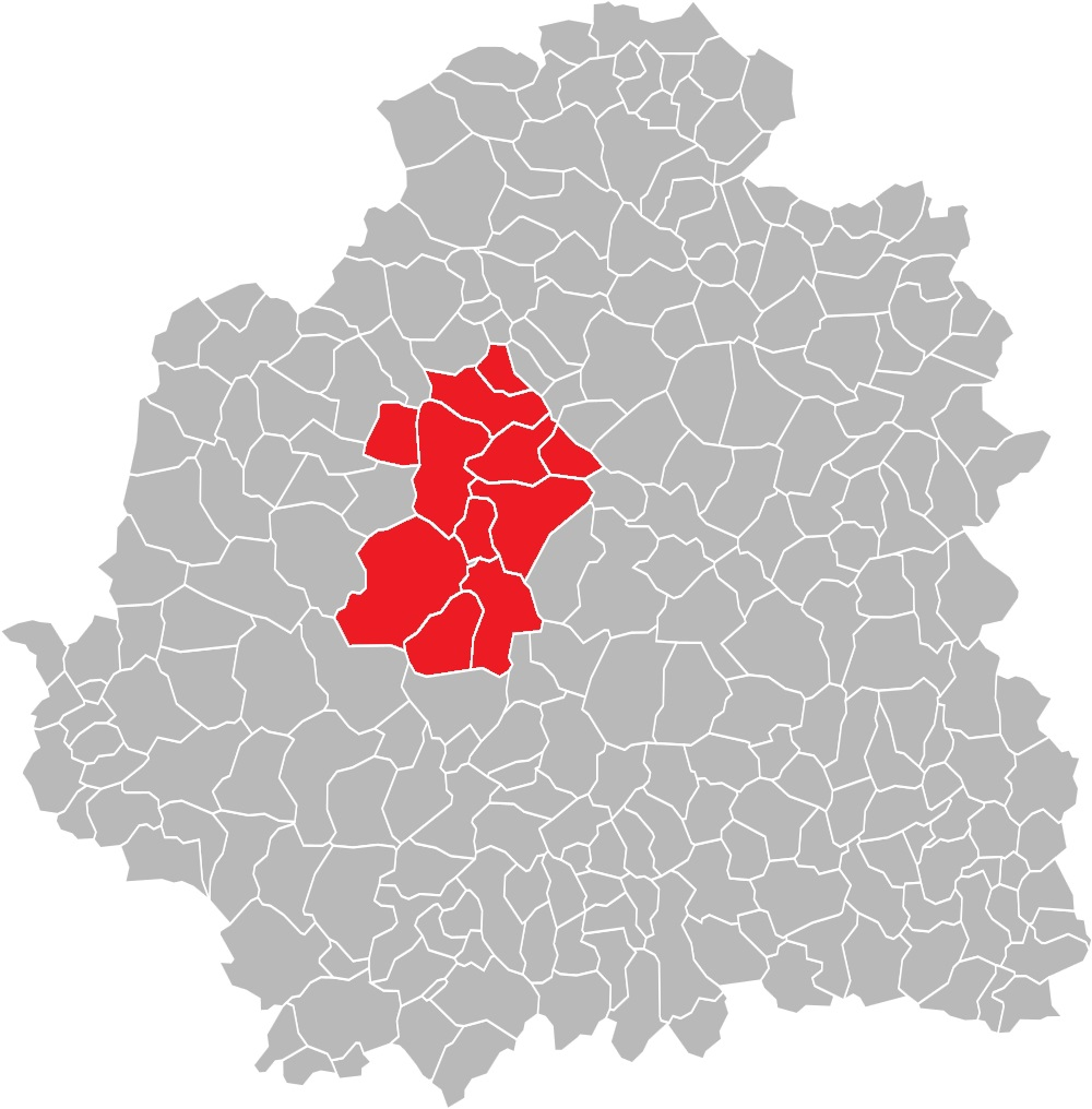 Carte des communes de l'Indre (36) : Le canton de Buzançais, de 1790 à 2015.